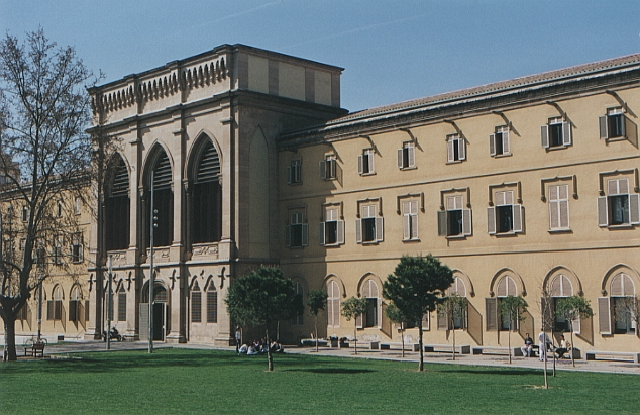 Universitat de Lleida